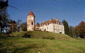 chateau loisy patrimoine